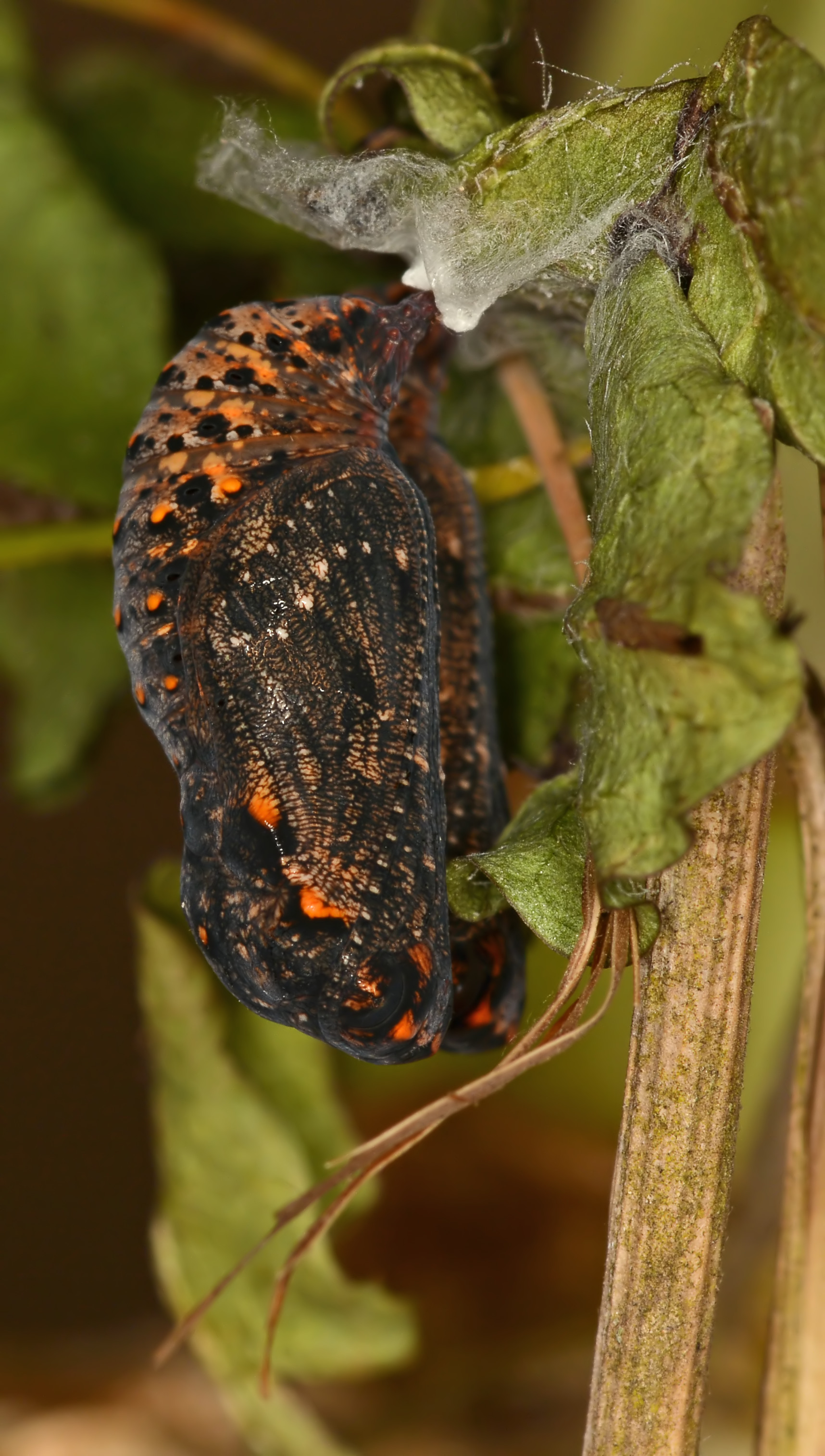 Wegerich-Scheckenfalter (Melitaea cinxia), Puppe aus meiner Heimaufzucht